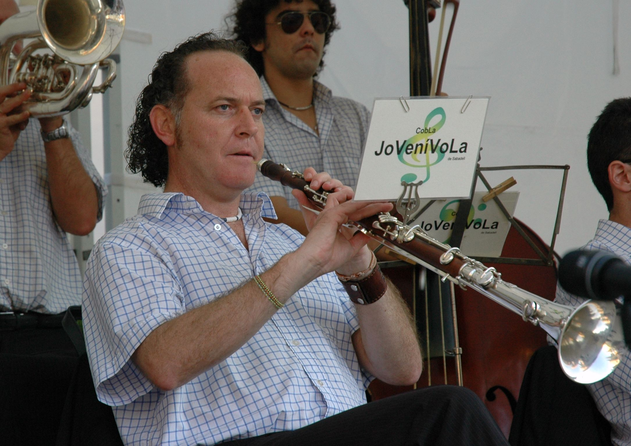 Enric Ortí i Martin, catalan composer